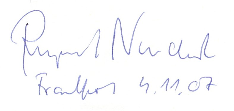 Autograph von Rupert Neudeck